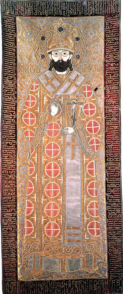 Покров на раку святителя Филиппа. происходит из мастерской Евдокии Андреевны Стрешневой и вложен от имени ее и ее мужа, боярина Василия Ивановича Стрешнева, родственника царицы Евдокии Лукьяновны Стрешневой, в Соловецкий монастырь. Святитель представлен благословляющим двуперстно перед грудью и держащим в левой руке Евангелие, оклад которого украшен изображением Распятия. Саккос орнаментирован крупными крестами в медальонах, а его подол — гирляндами из волют растительного стебля. На голове Филиппа — круглая святительская шапка с херувимом, без явно выраженной опуши. Лицо с тонкими чертами, обозначенными графической линией, шитое некрученым шелком «атласным» швом, обрамленное небольшой курчавой бородой. В сопроводительной надписи по сторонам головы, сложной вязью, святитель обозначен как «митрополит Московский чудотворец».